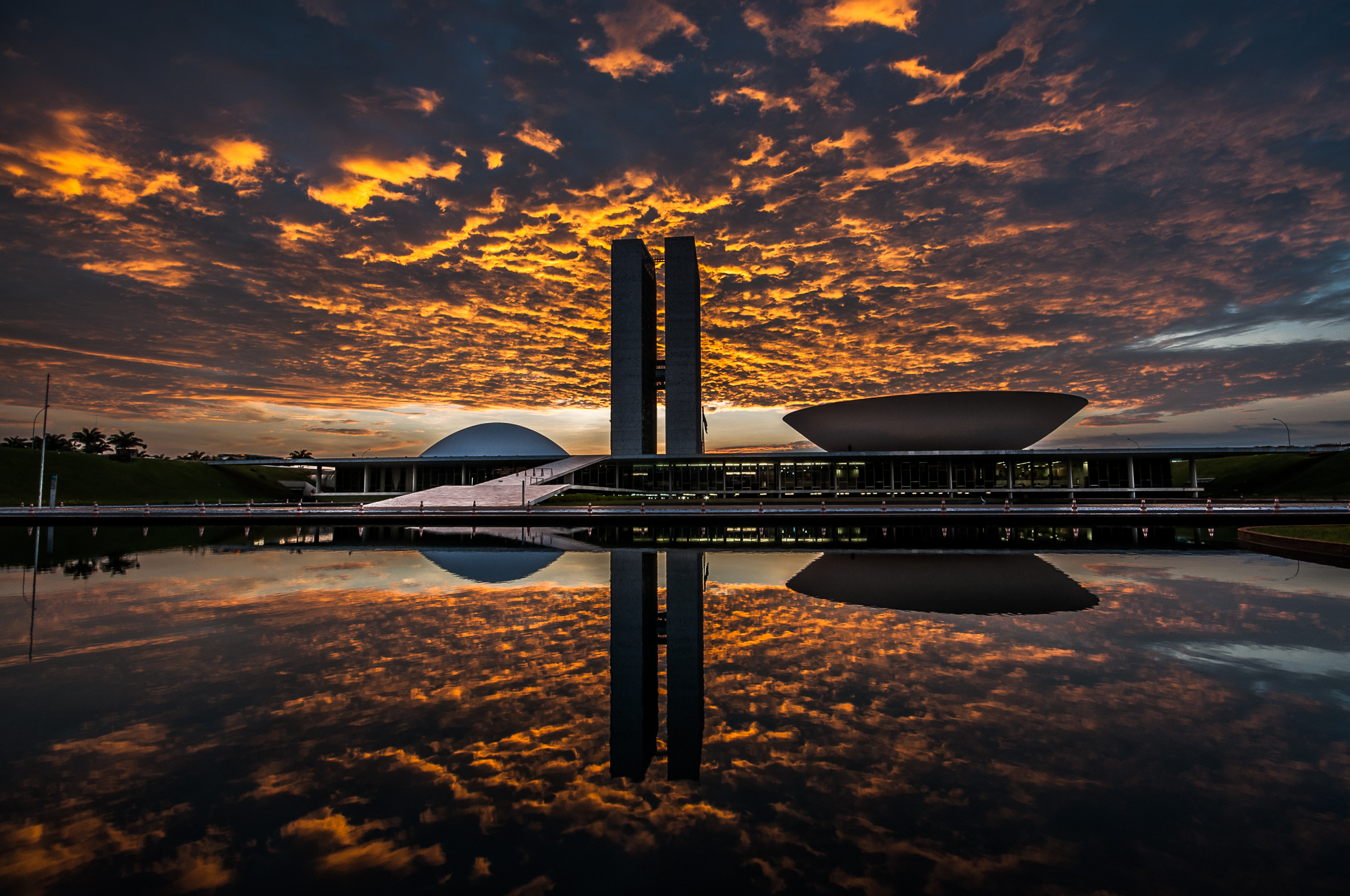 Brazilian National Congress, Brasilia, Federal District